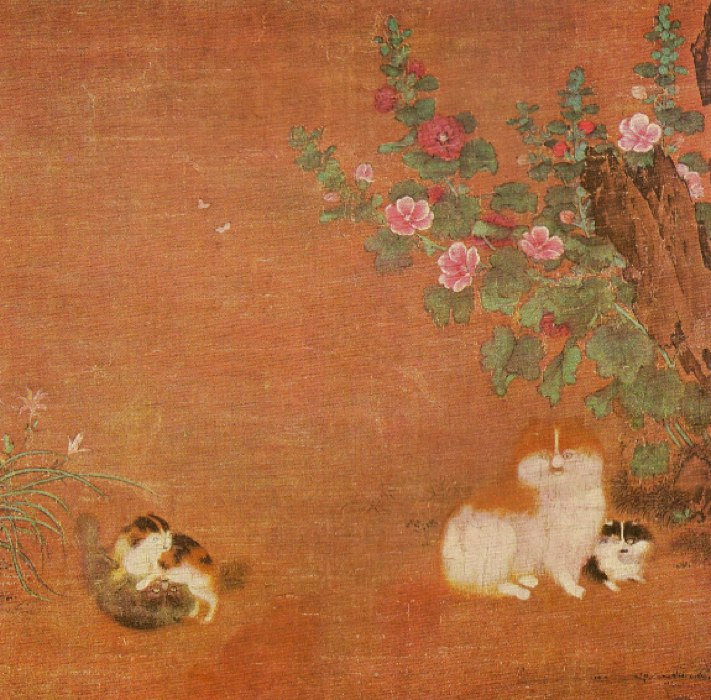 Une chatte et ses petits attribué au peintre chinois Mao Yi du XIIe siècle. Feuille d'album; encre et couleurs sur soie (25,5x25,8 cm). Cette peinture est conservée à Osaka au Yamato Bunka-Kan.